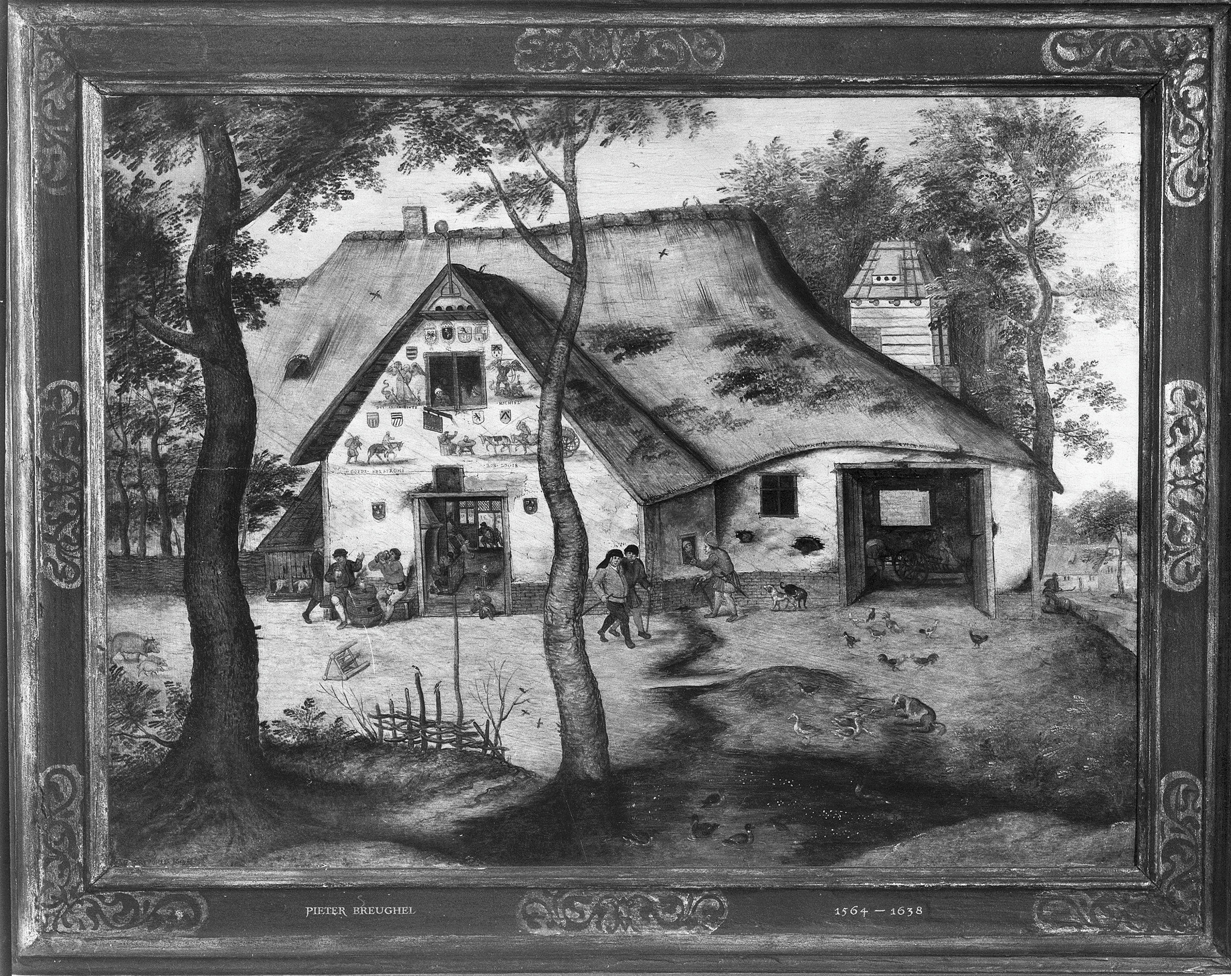 Leyssensmolen: Vlaamse herberg door Pieter Breughel 1564-1638